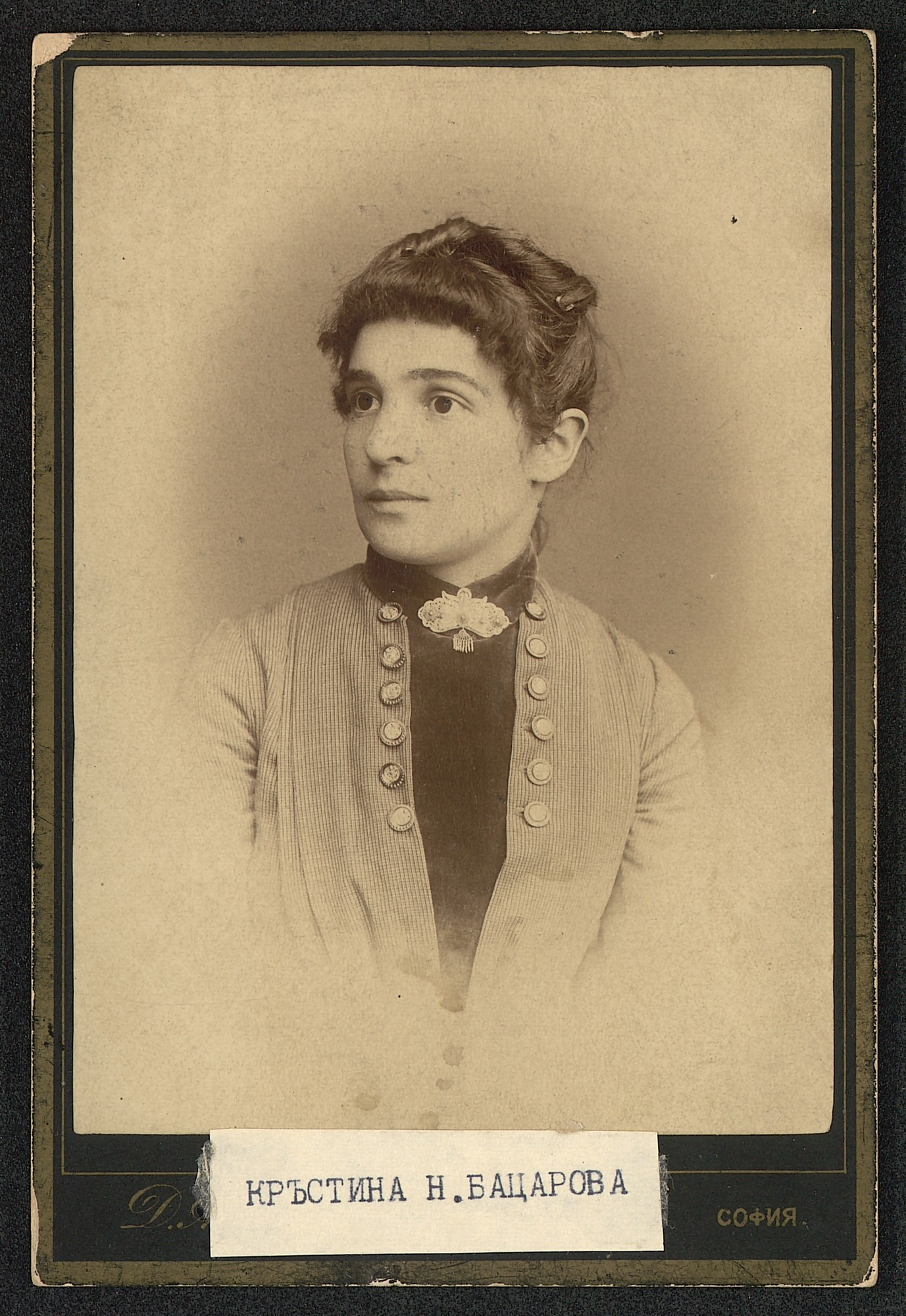 Кръстина Бацарова (майка на Екатерина)